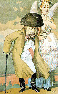 Napoleon III. (Cartoon) "Le régime parlementaire." Dessin de Coïdé, "Sovereigns n°1", Vanity Fair, 4 septembre 1869.